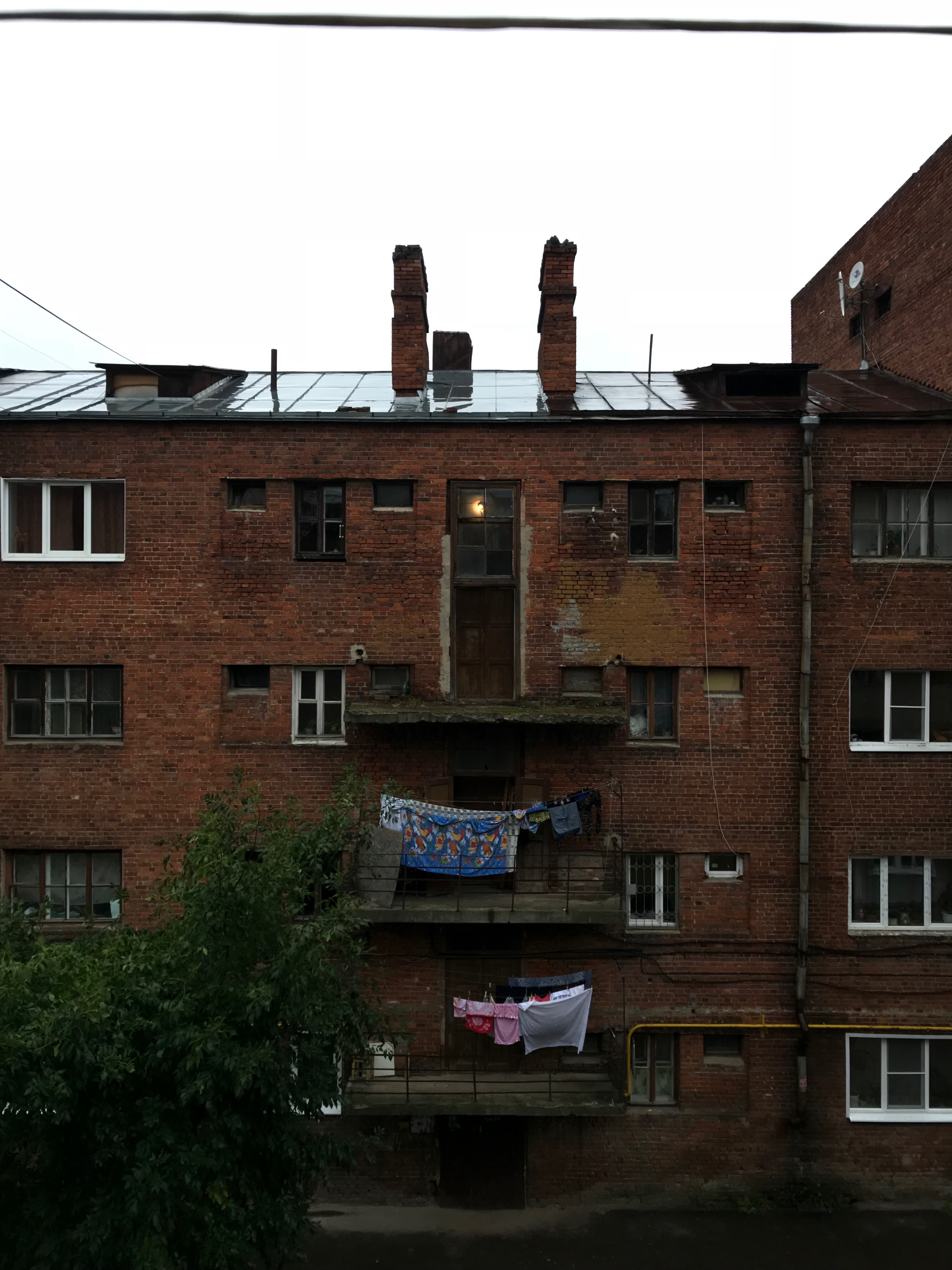 Неутешительно